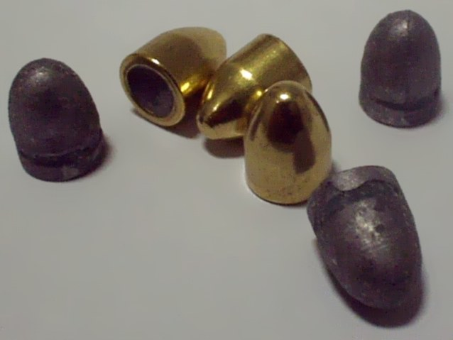 Descrição: 6 projéteis. Os mais escuros são de chumbo e os brilhantes são encamisados. Fonte/Créditos: Eduardo Xavier Licença